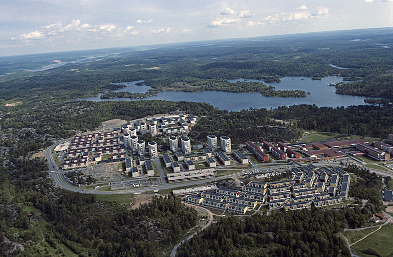 Flygbild över bostadsområdet. Motiv: Lövgärdet Nyckelord: Flygbilder Kategori: Bostadsområde Flygbild över bostadsområdet.